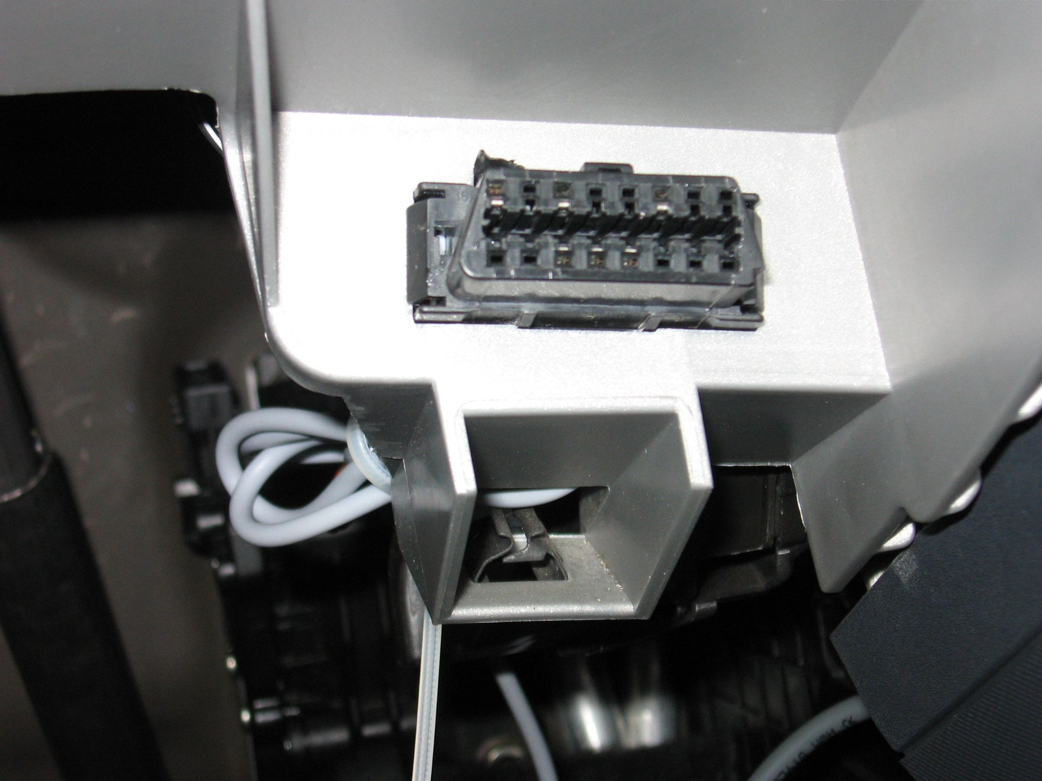 OBD II connector